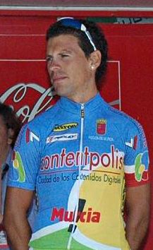 Manuel Vázquez Hueso. Contentpolis-Murcia, Euskal Bizikleta 2008